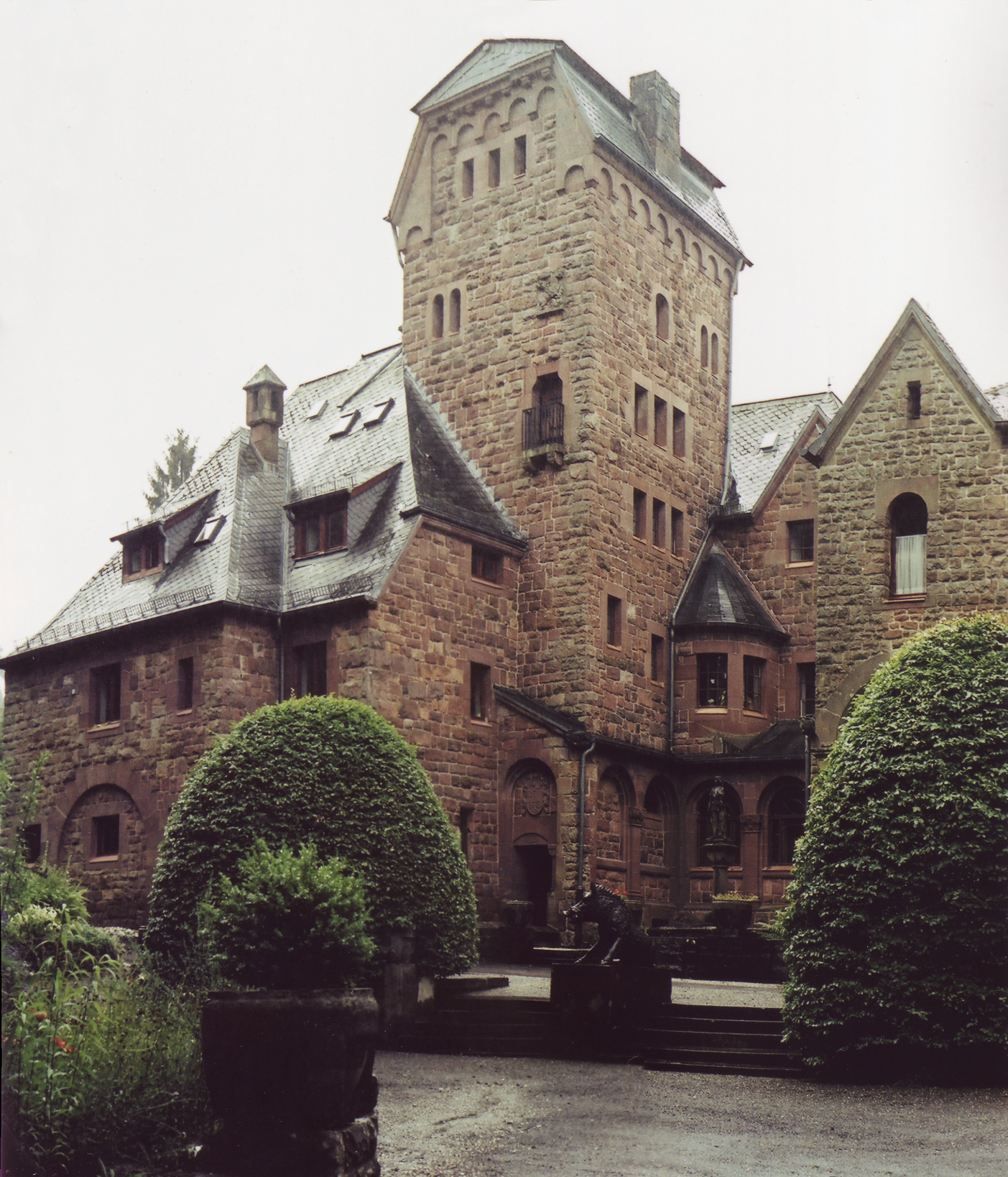 Nordfassade des Schlosses Bergfeld in Eisenschmitt